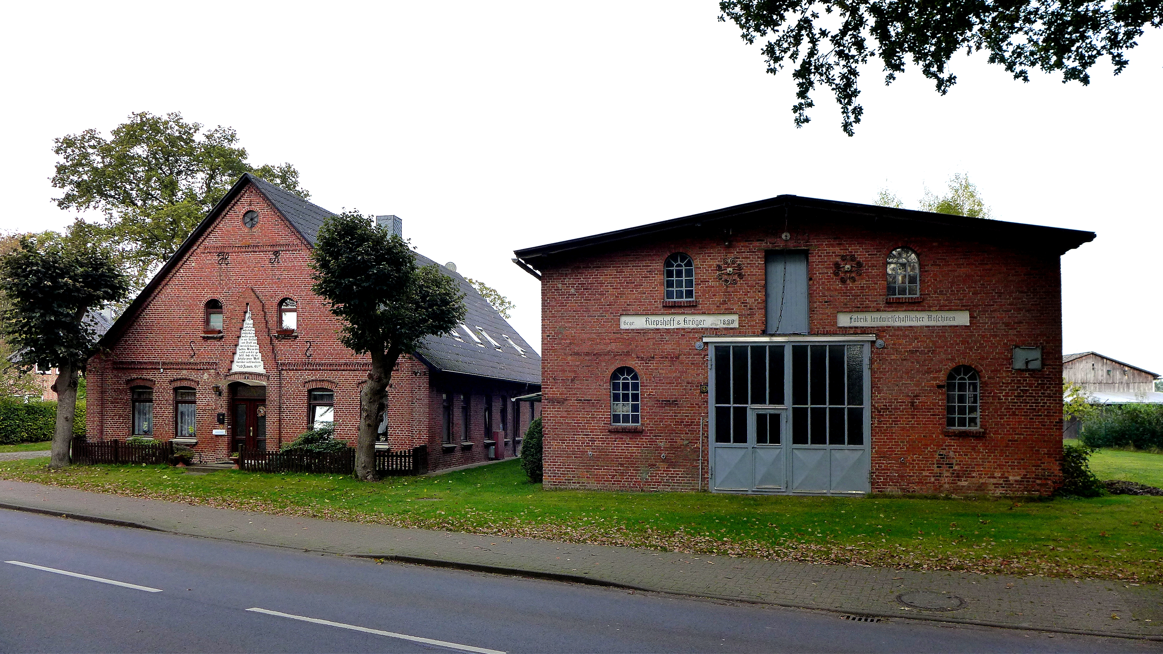 Westervesede, ein Ortsteil von Scheeßel. 1890 erbaute der Schmiedemeister Heinrich Riepshoff in Westervesede eine Schmiede mit einer nebenliegenden Zimmerei mit Sägegatter. Gemeinsam mit dem Tischlermeister Johann Kröger, welcher sich eine Tischlerwerkstatt oberhalb der Schmiede einrichtete, wurden landwirtschaftliche Maschine wie Göpel und Dreschmaschinen gebaut. Das inzwischen zu einer Maschinenfabrik angewachsene Unternehmen Riepshoff & Kröger erlitt 1925 einen schweren Brandschaden und wurde erneut aufgebaut (siehe Foto). Später verließ Johann Kröger das Unternehmen, Heinrich Riepshoff verstarb 1936. Der designierte Nachfolger und Sohn Heinrich Riepshoff fiel im Weltkrieg II, damit erlosch die Maschinenfabrik Riepshoff & Kröger. Foto von 2016-10.